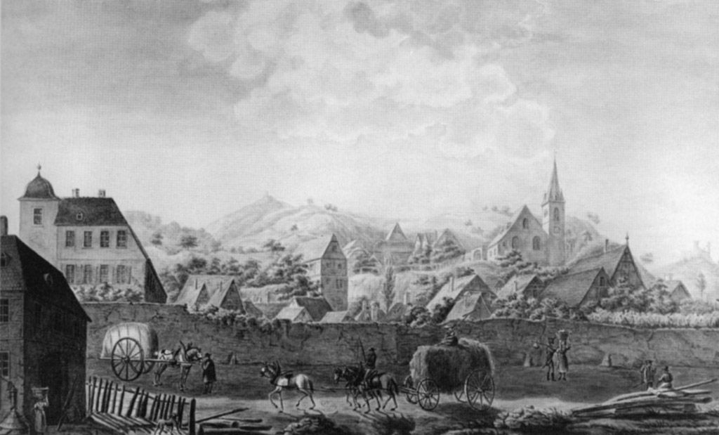 Zwingenberg an der Bergstraße um 1810. Gemälde von Wilhelm Merck (1782-1820